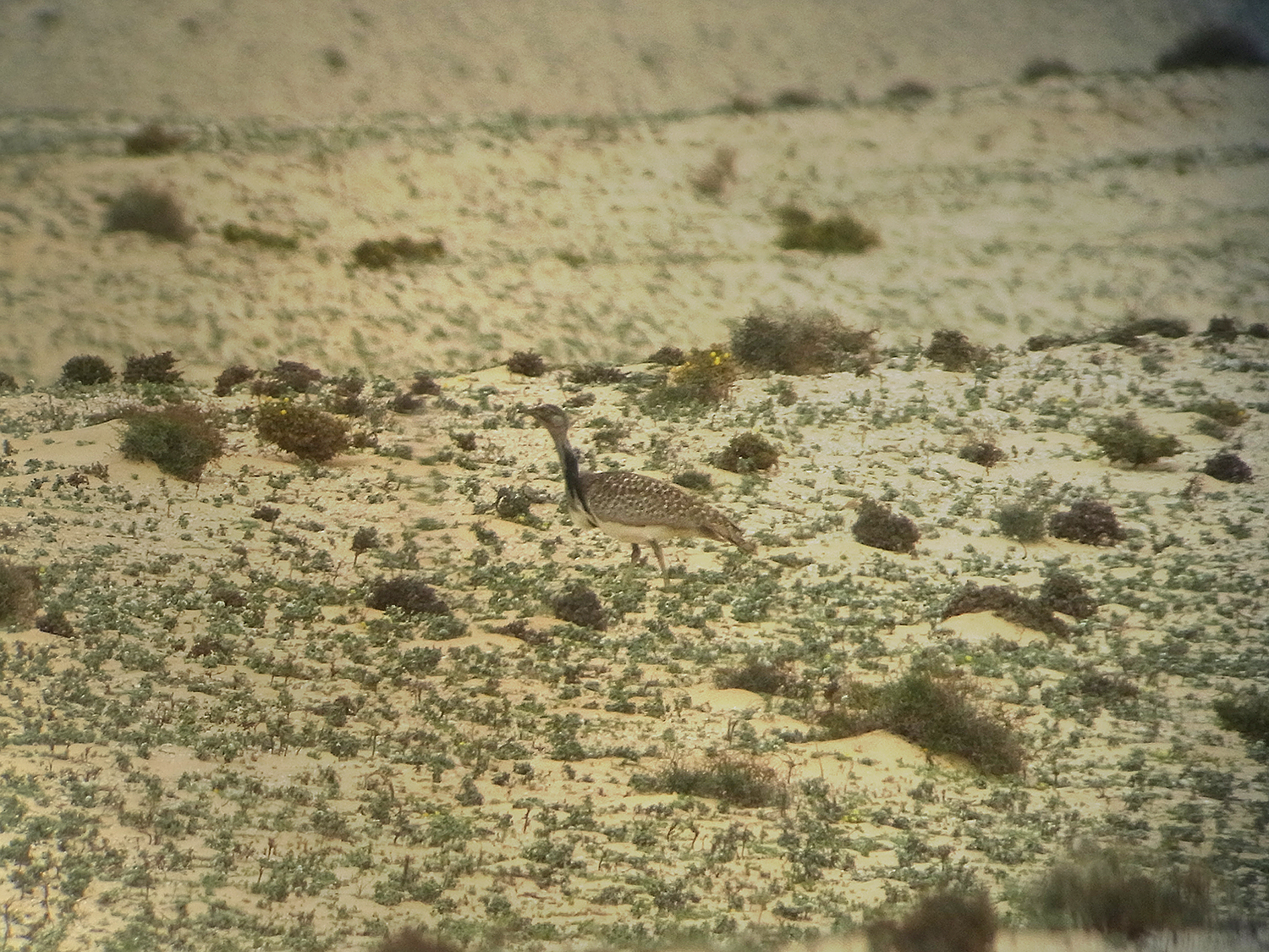 Saharakragentrappe (Chlamydotis undulata fuerteventurae) auf dem Istmo de la Pared, Fuerteventura